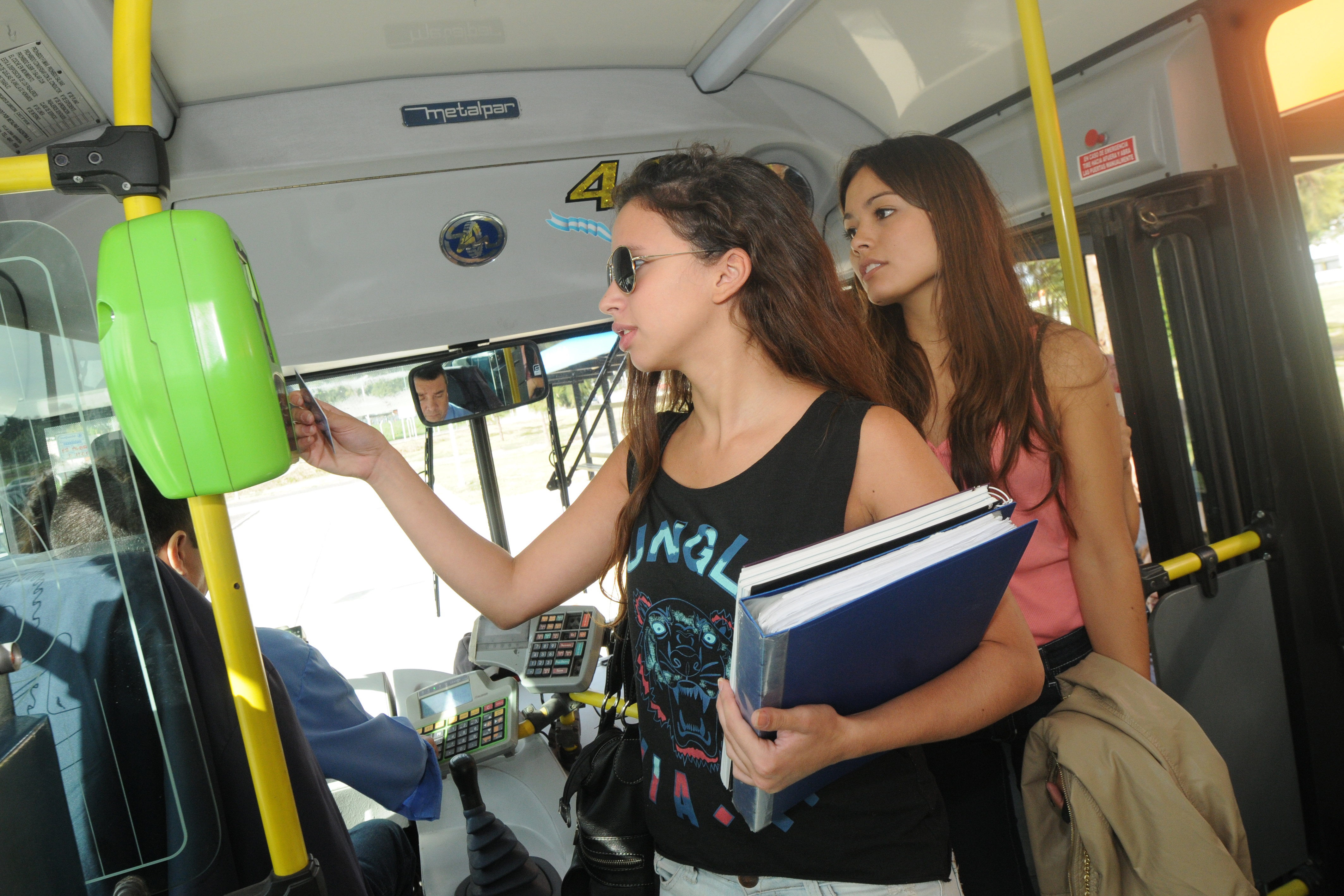 Usuarios del transporte publico pagando el boleto mediante el SUBE